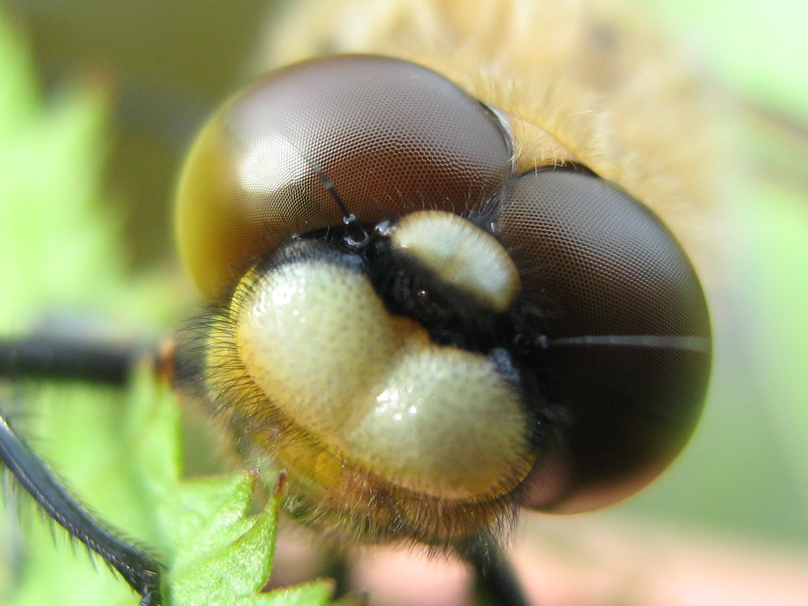 Pildil kiililiste liitsilmad.